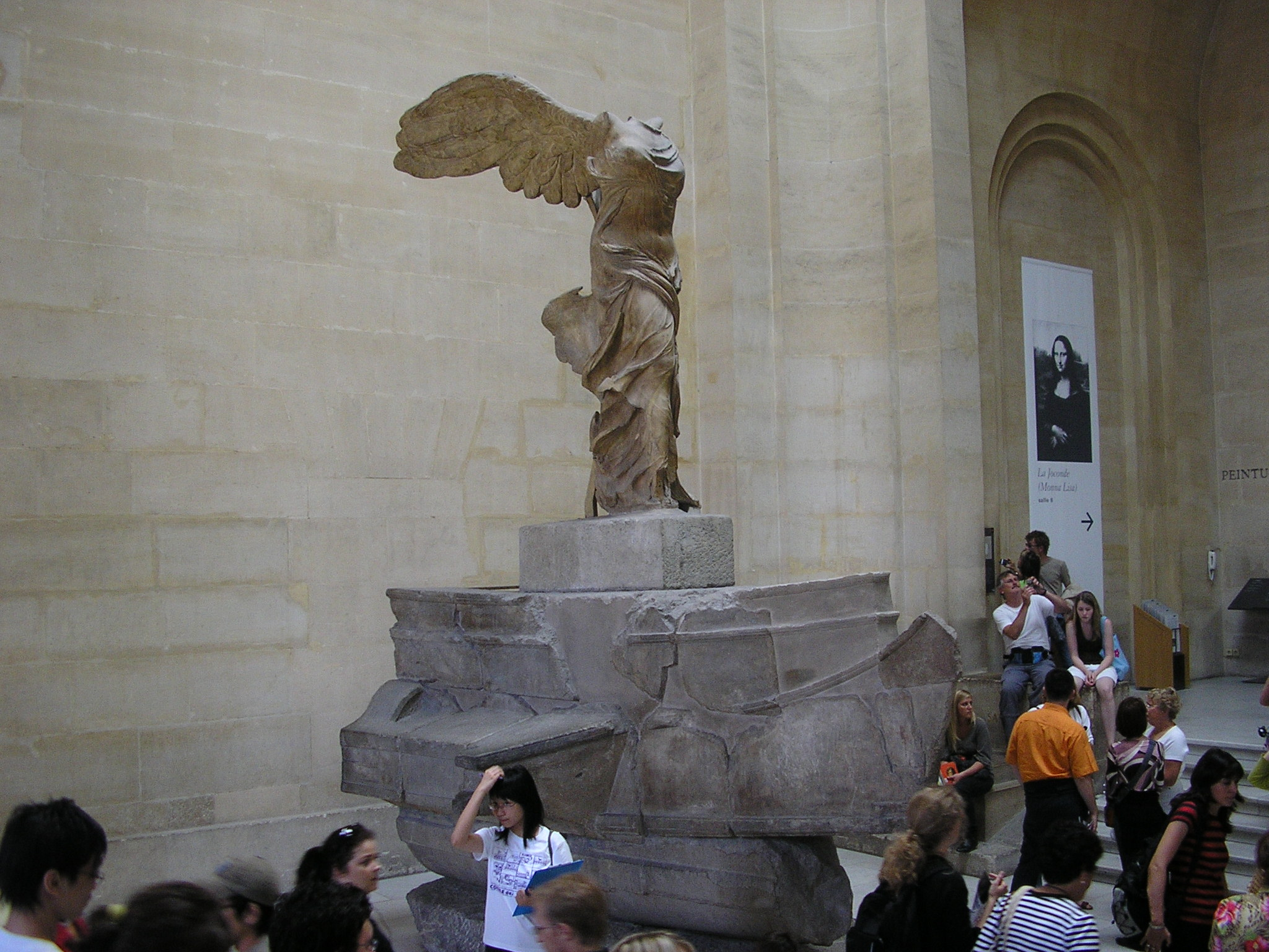 Escultura de la Victoria de Samotracia en el Museo parisino del Louvre.